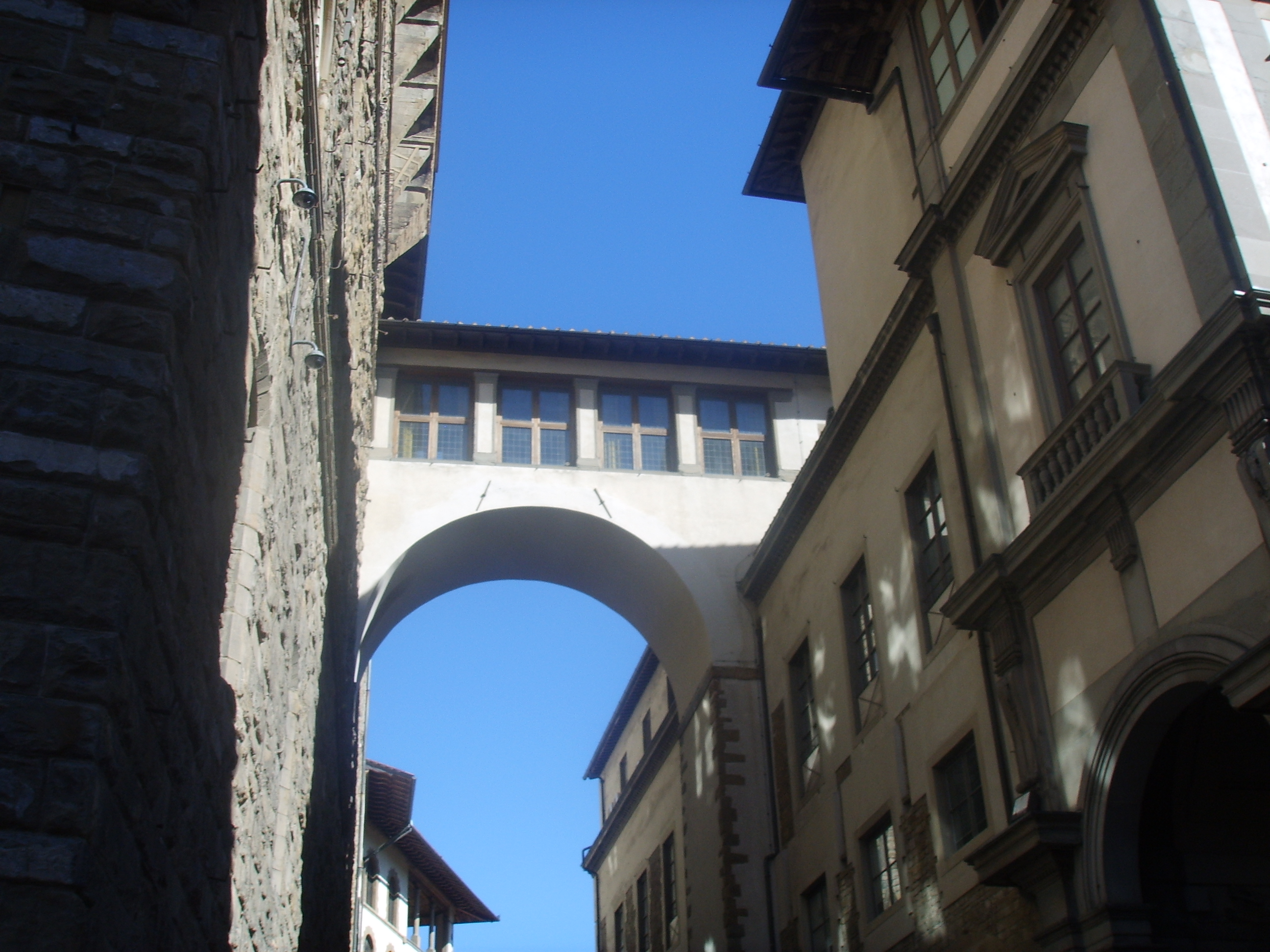 Vasari Corridor, corridoio vasariano in Florence, Italy